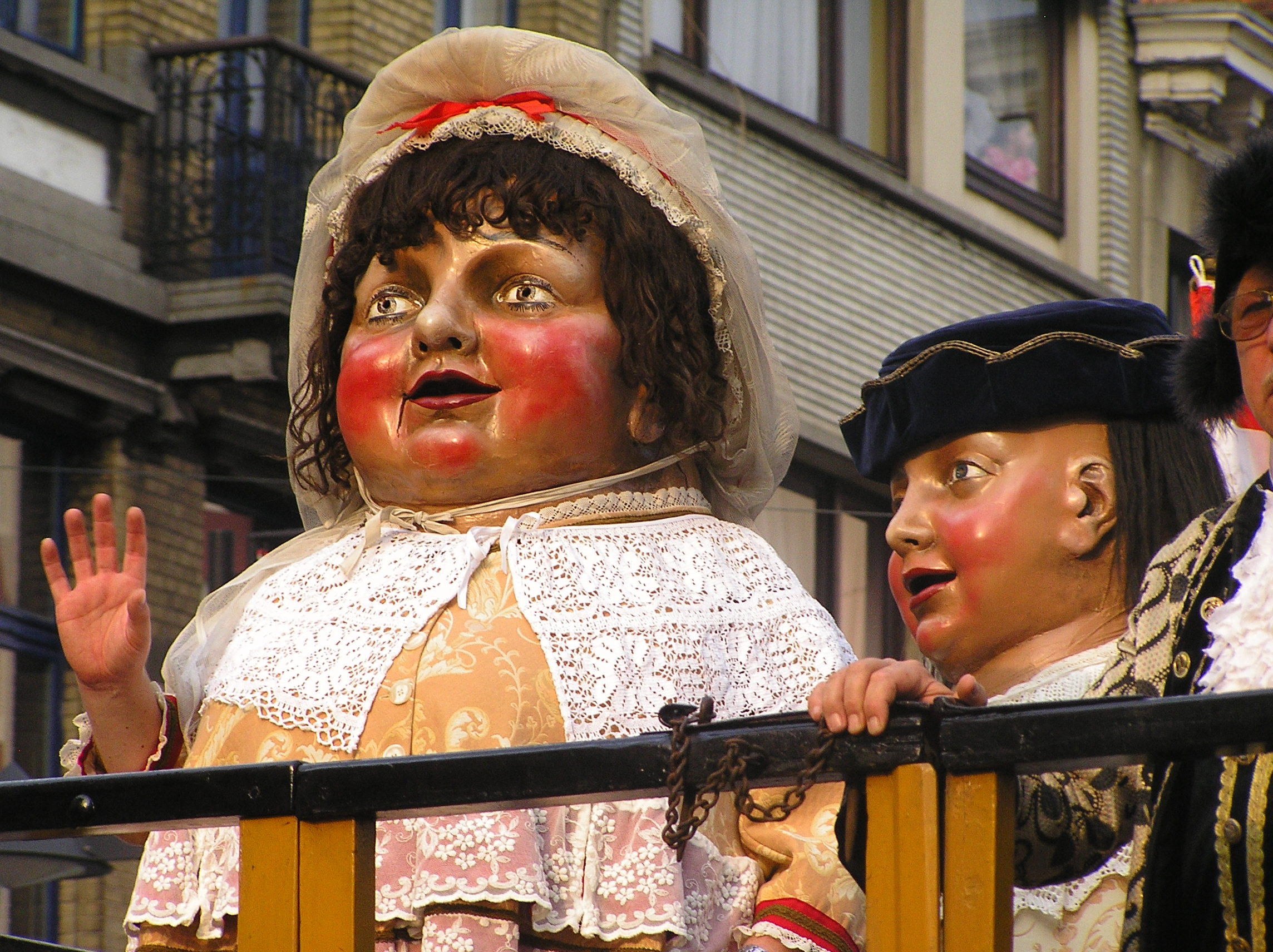 Reuskens van Borgerhout sculpture from 1712.